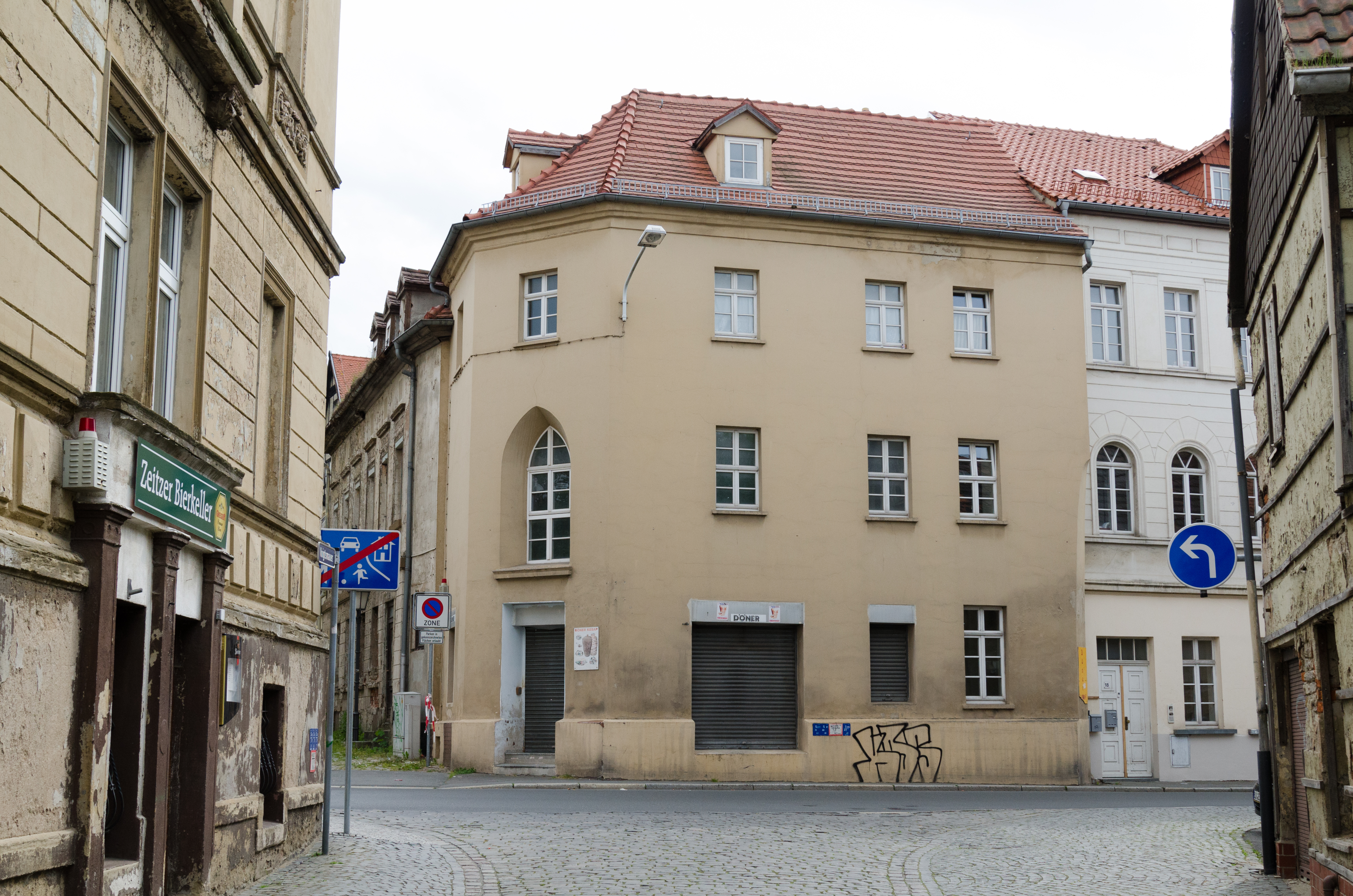 Zeitz, Kalkstraße 18